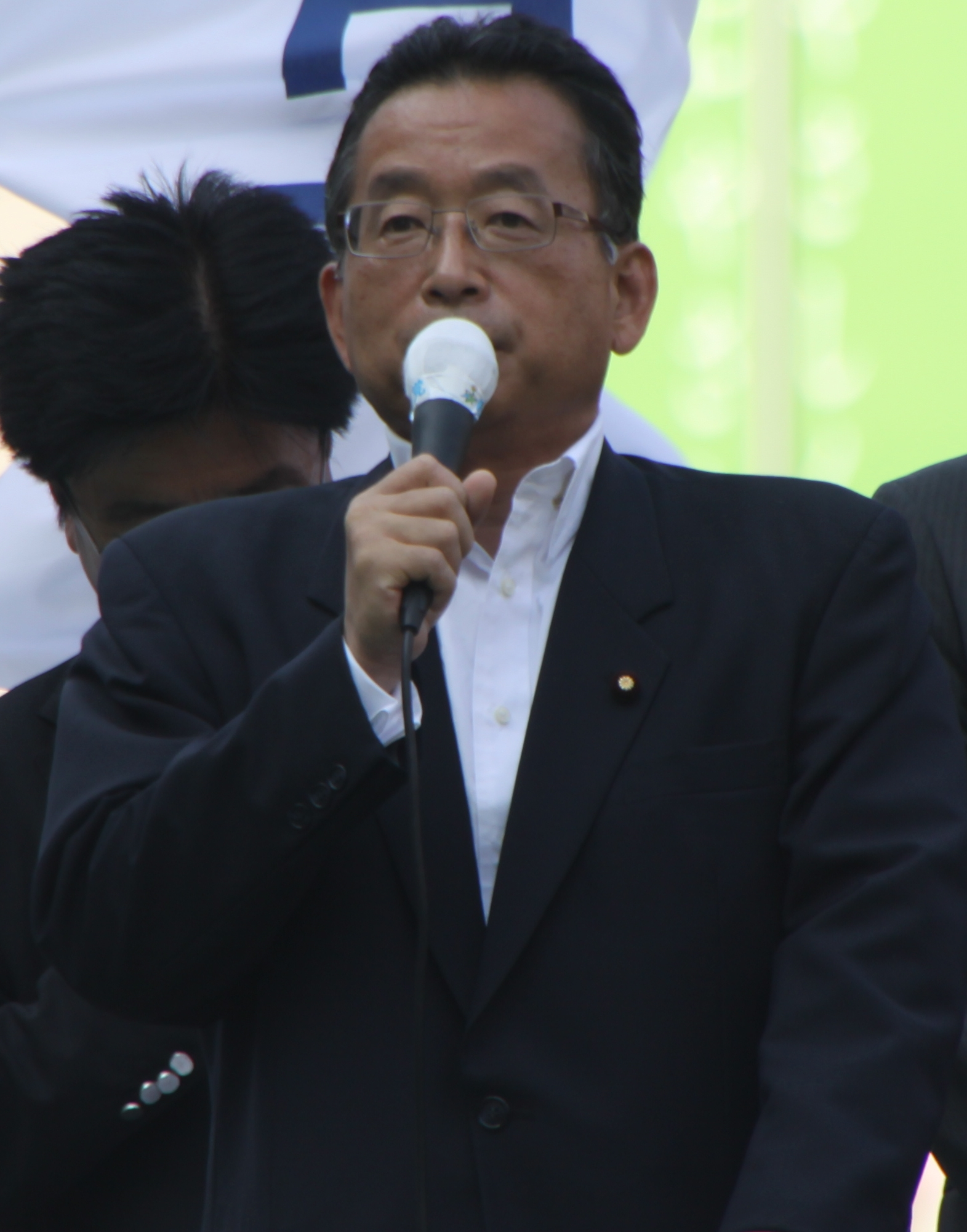 山本有二、創生「日本」による池袋駅での演説